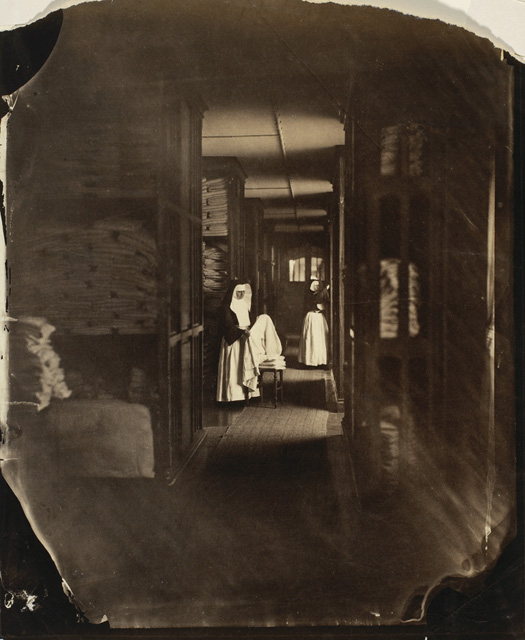 Asile impérial de Vincennes. La lingerie, épreuve à l'albumine argentique, 22,3 x 18,9 cm. Musée des beaux-arts du Canada (nº 32505). Acheté en 1968